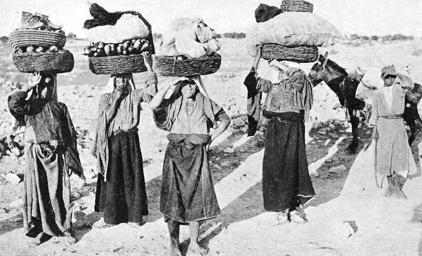 Fellahat going to Market